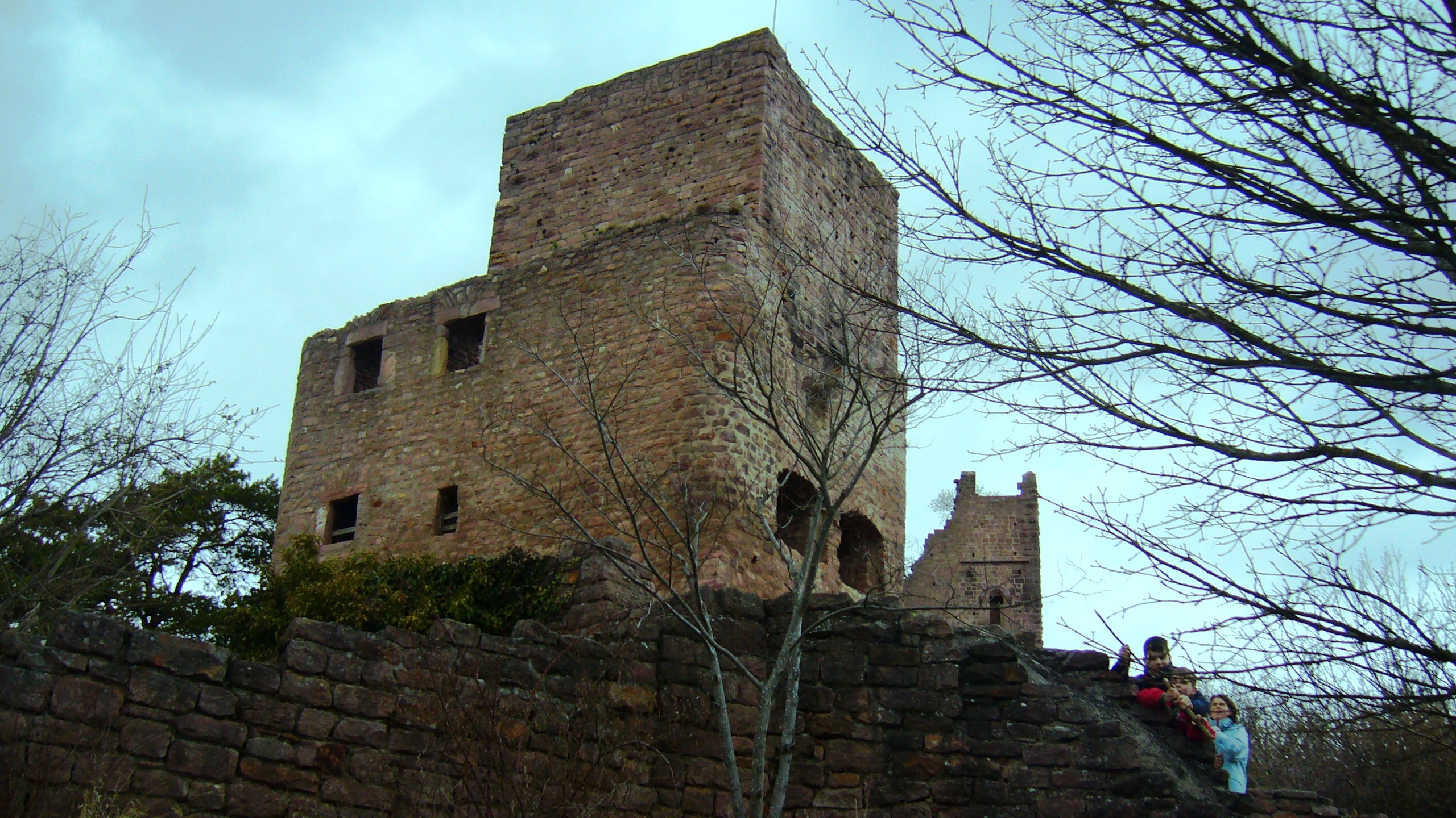 Le donjon du château de Wahlenbourg